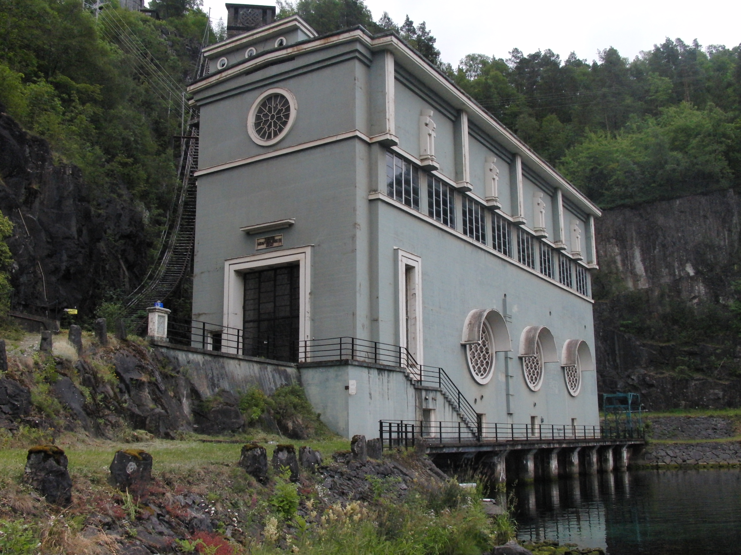 Sauda III kraftverk, Nord.